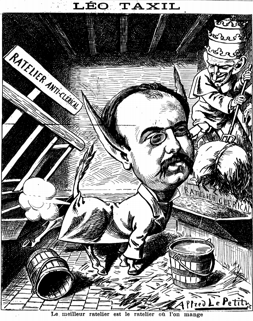 Caricature du Grelot en date du 9 août 1885. Léo Taxil, sous le traits d'un âne mange au ratelier clérical car le ratelier anti-clérical est vide